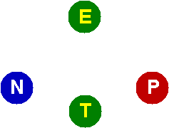 Position de la broche de terre dans les prises françaises (type E, position notée E) et dans les prises normalisées (type N, position notée T) par rapport aux broches de phase (P) et de neutre (N).